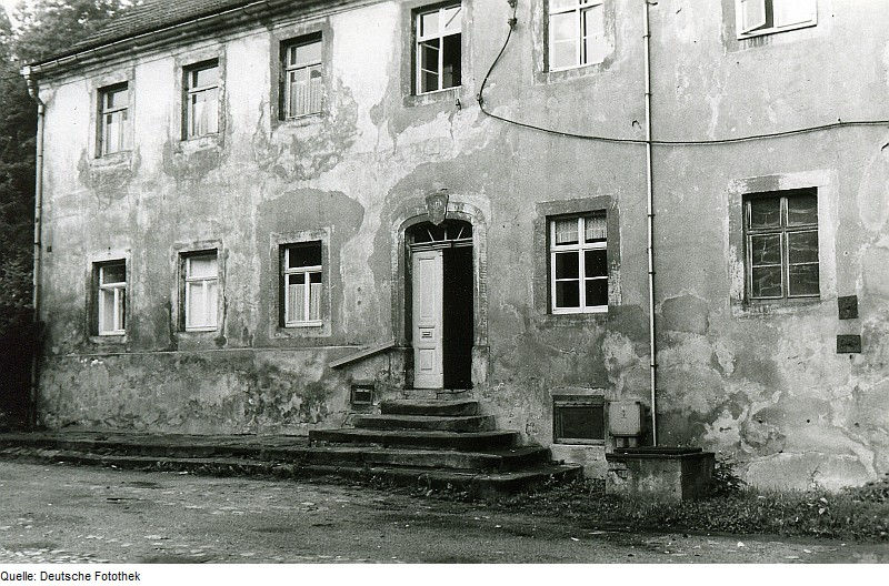 Original image description from the Deutsche FotothekRiesa-Gröba. Ehem. Papiermühle